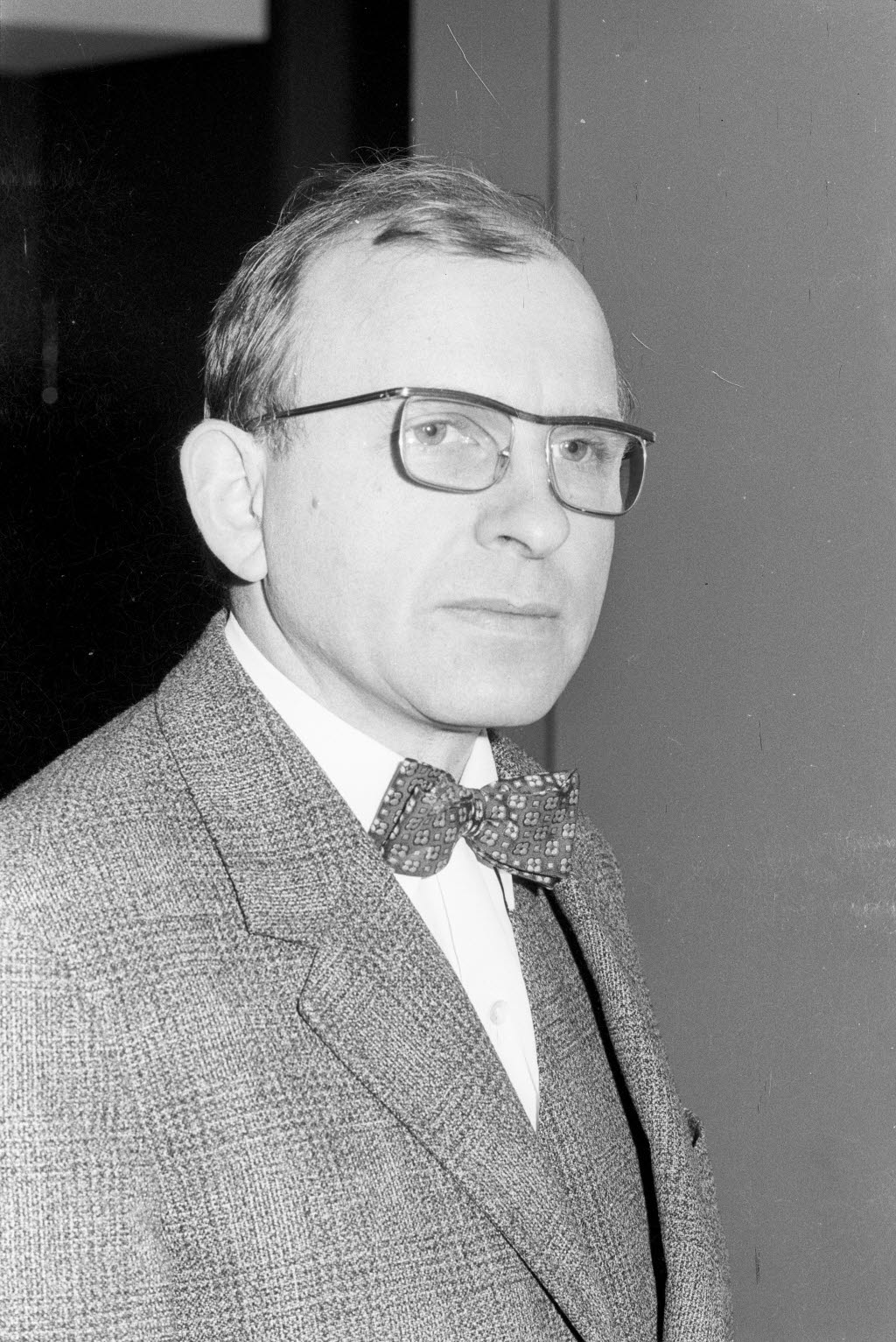 Der ordentliche Professor für Bürgerliches Recht an der Christian-Albrechts-Universität bewirbt sich erfolgreich als Universitätsrektor für 1973.